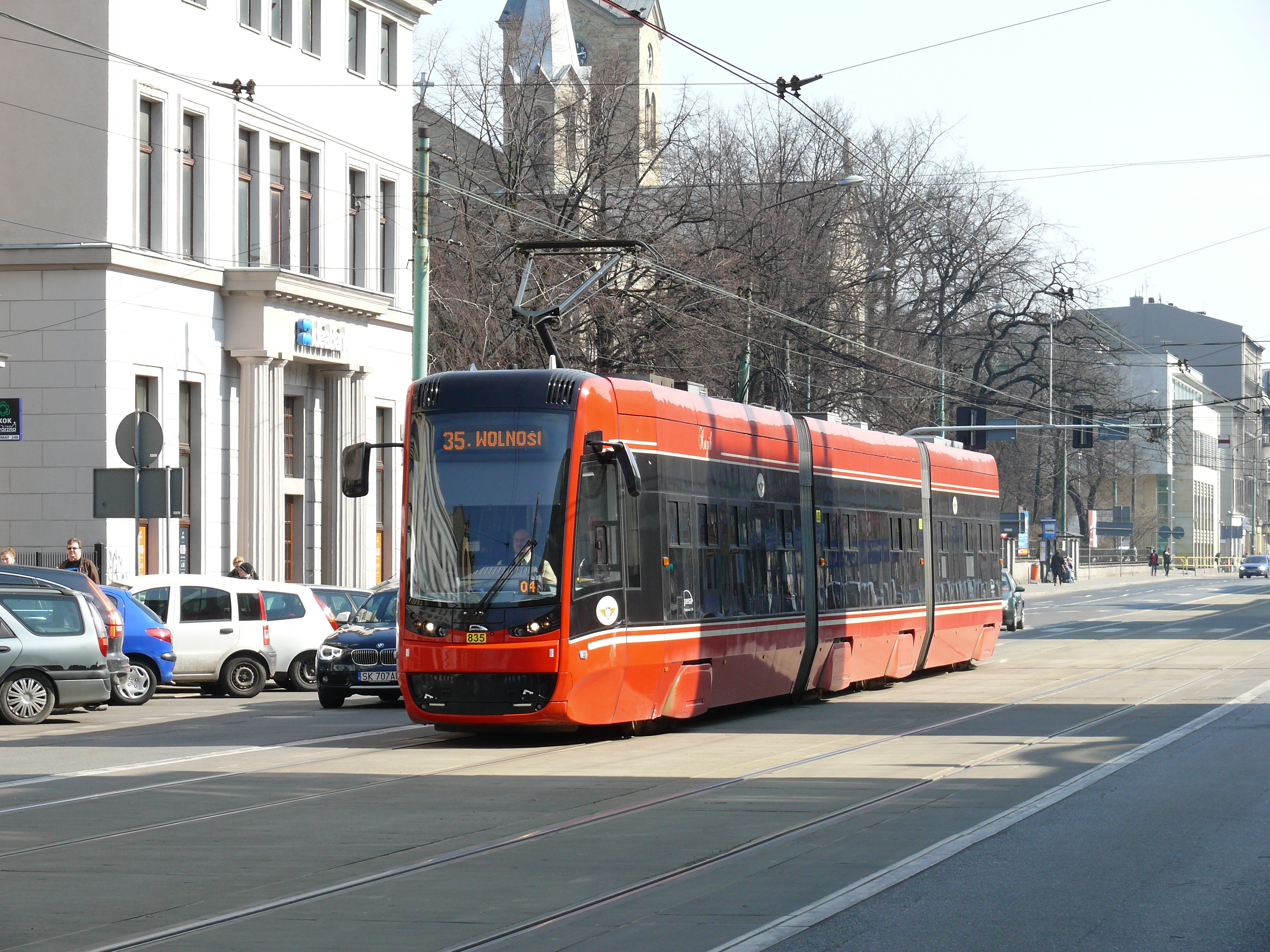 Straßenbahn vom Typ Twist des polnischen Herstellers Pesa, in der Ulica Warszawska Richtung Rynek in Kattowitz.